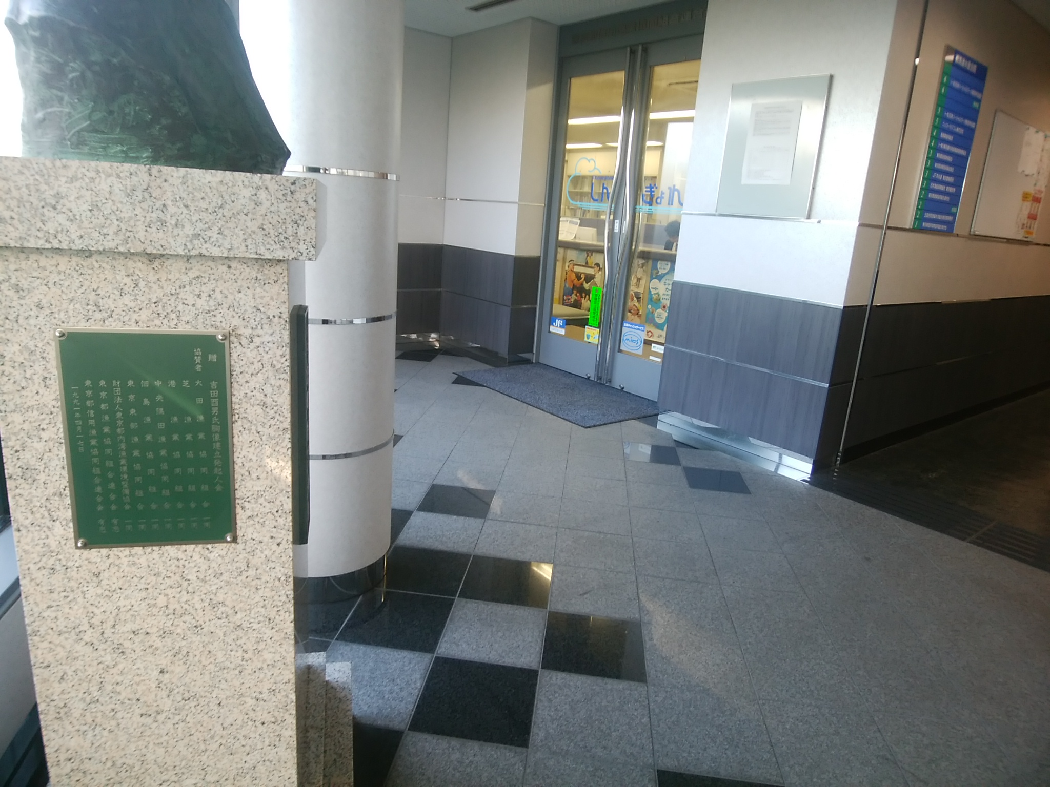 東京都信用漁業協同組合本所